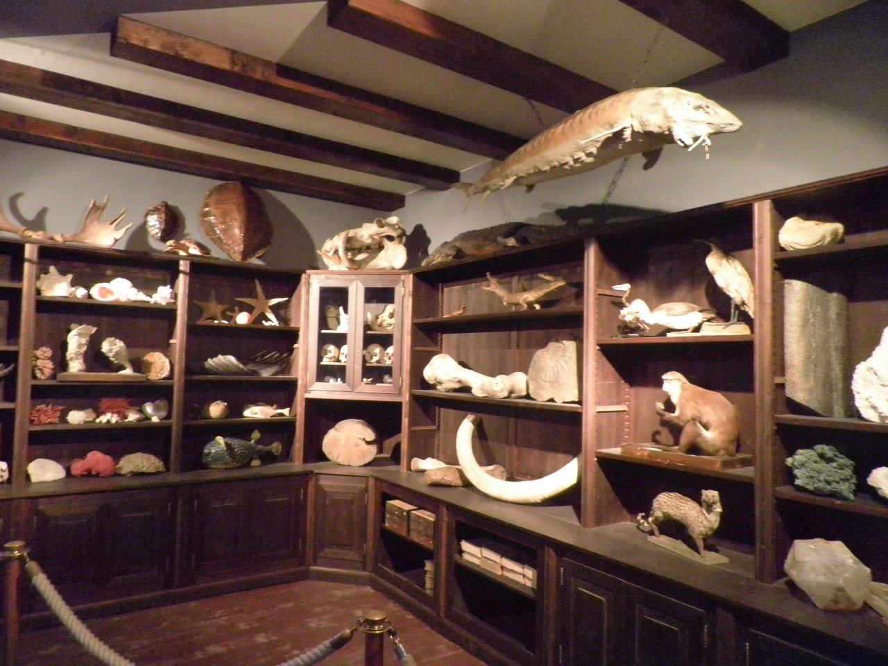 Documenta 13 Kassel 2012. Ottoneum, Kassel (Hessen, Germany)